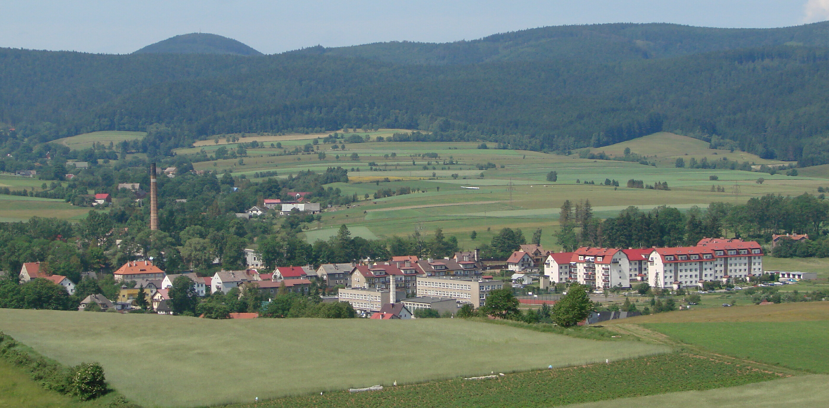 miasto Chełmsko Śląskie, Lubawka